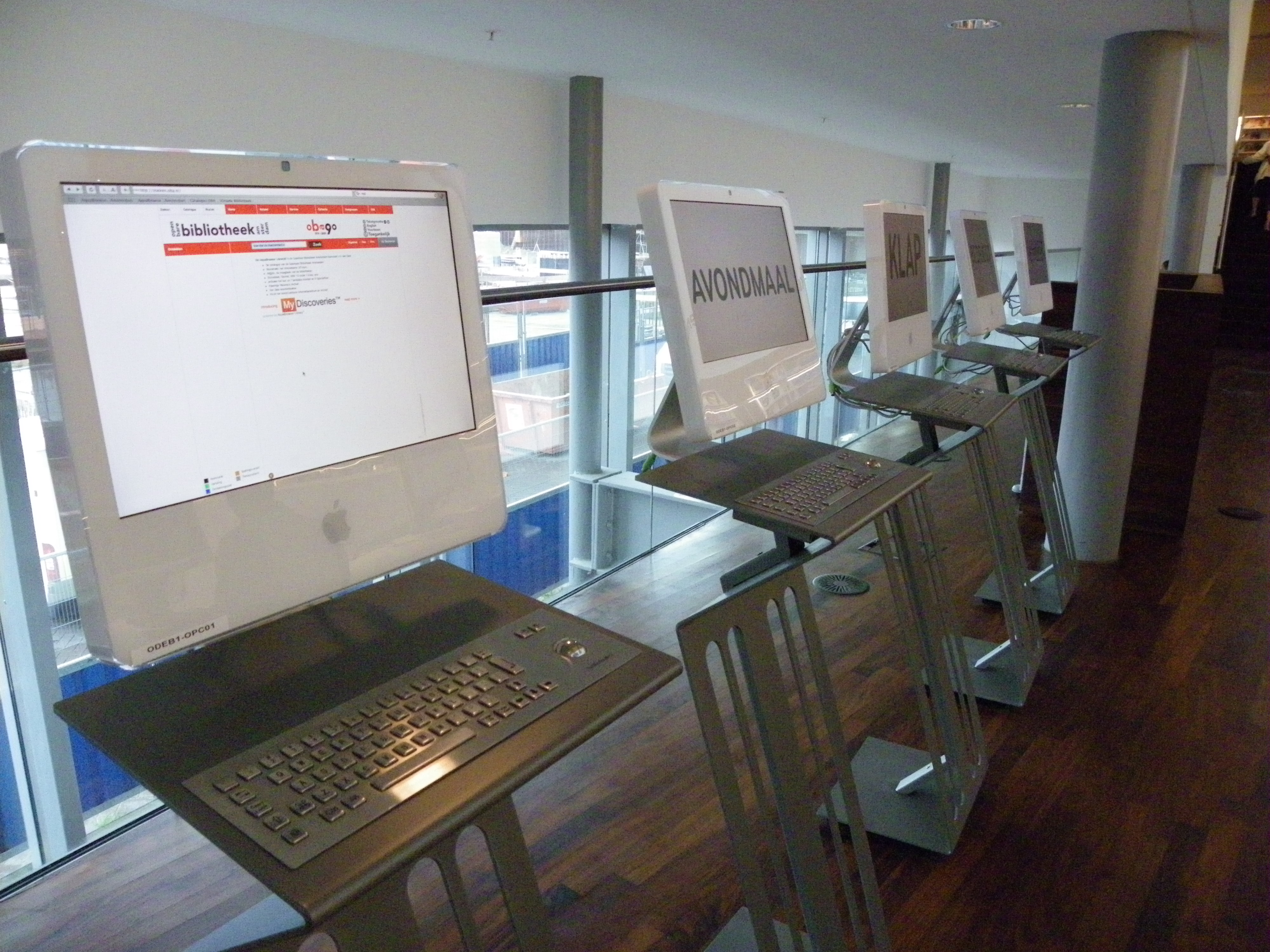 Openbare Bibliotheek Amsterdam